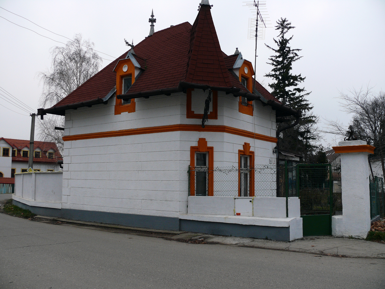 Strážny domček v Stupave